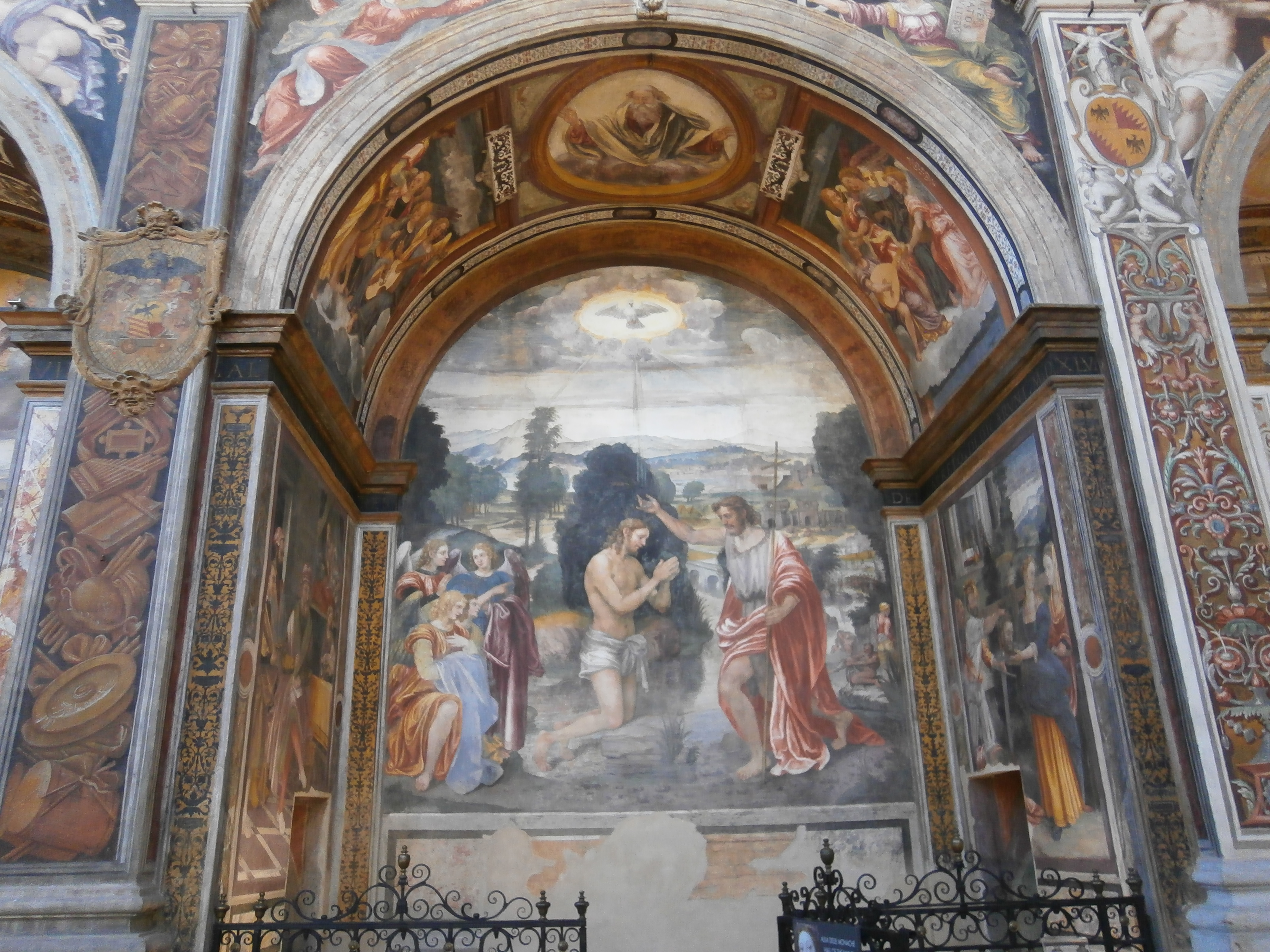 Interno della chiesa di San Maurizio al Monastero Maggiore - Milano - affreschi